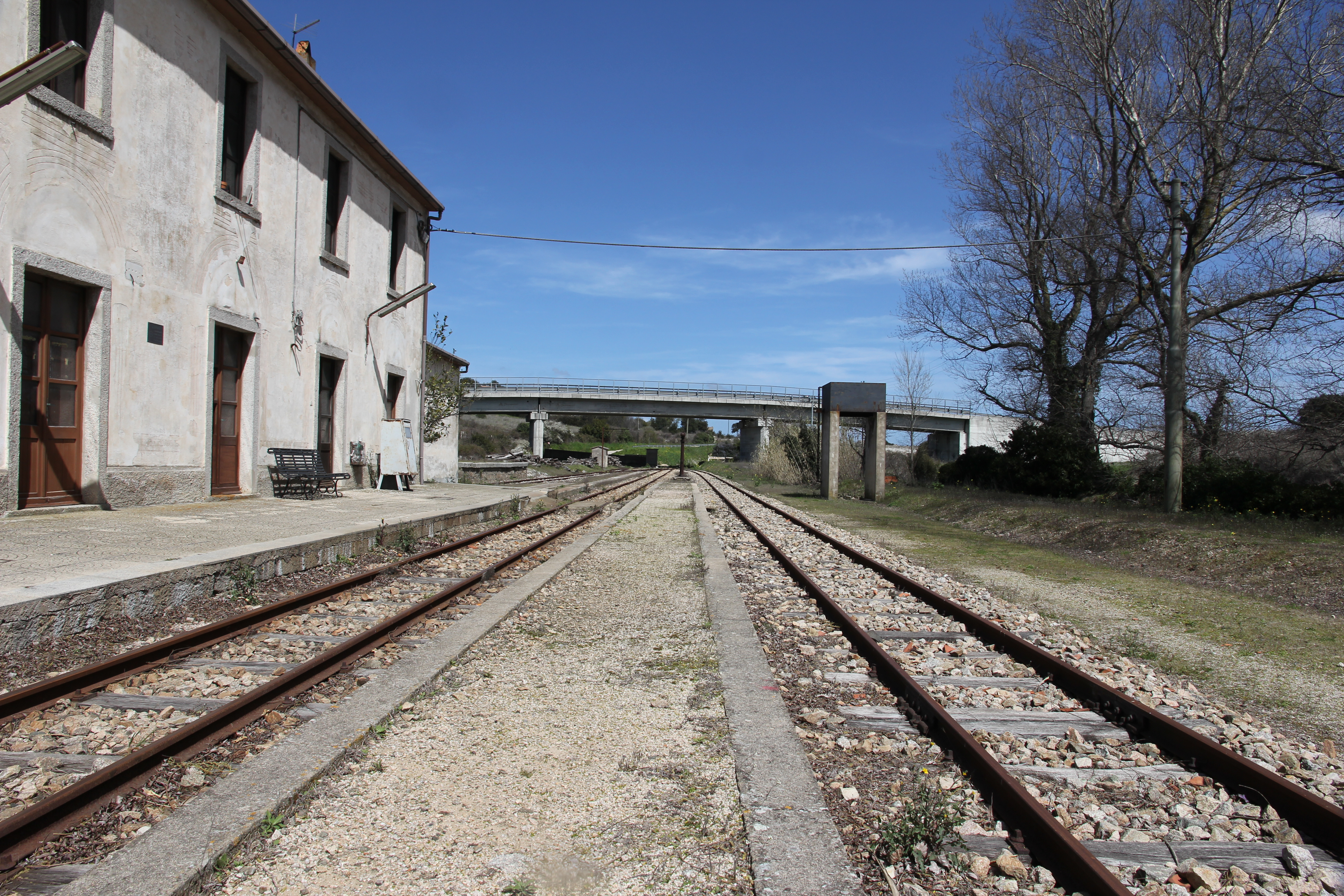 Ferrovia Sassari-Tempio-Palau. Stazione ferroviaria di Luras (comune di Calangianus).